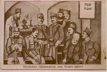 Jewish Soldiers Prayer WW1